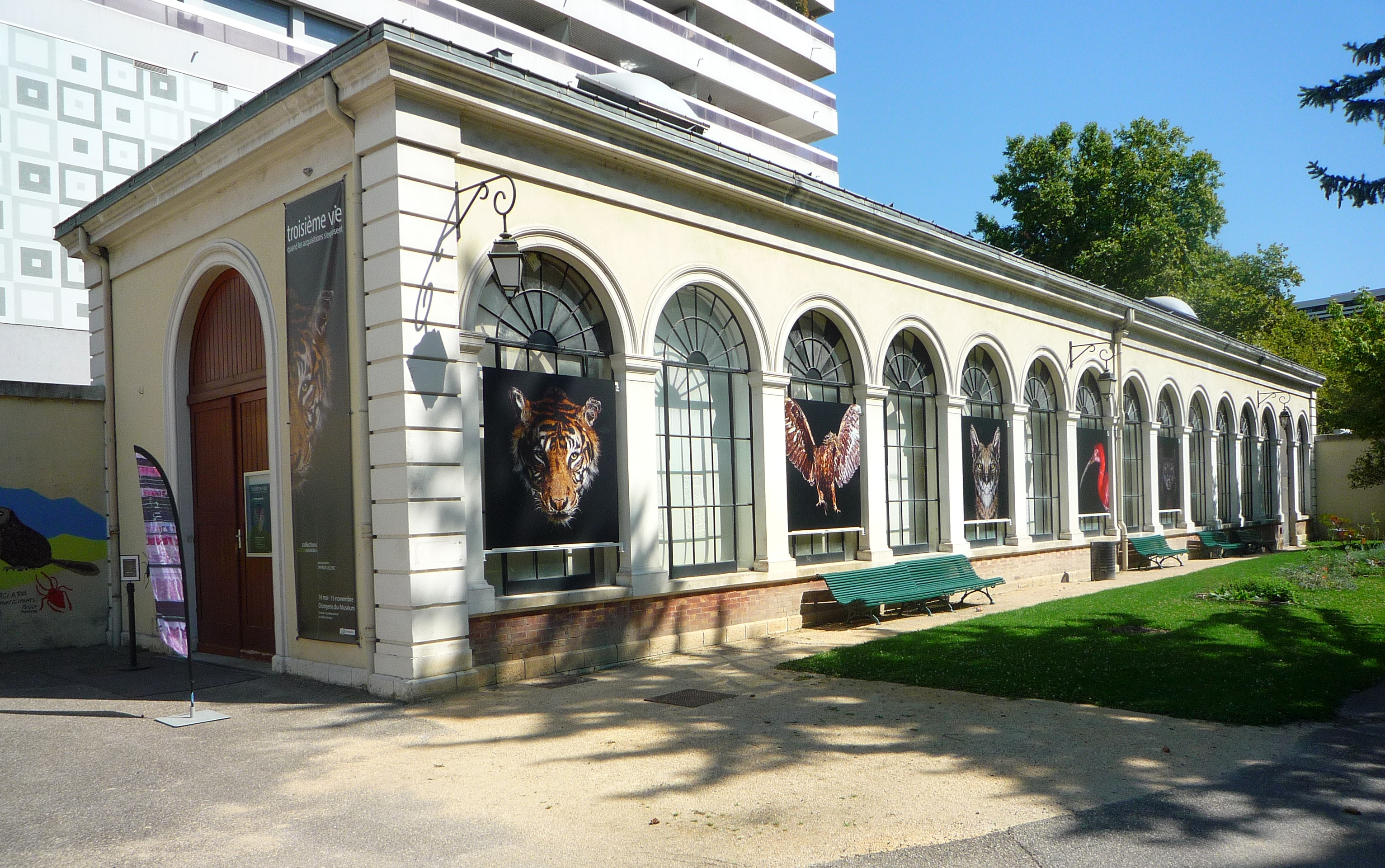 Orangerie du muséum d'histoire naturelle de Grenoble.